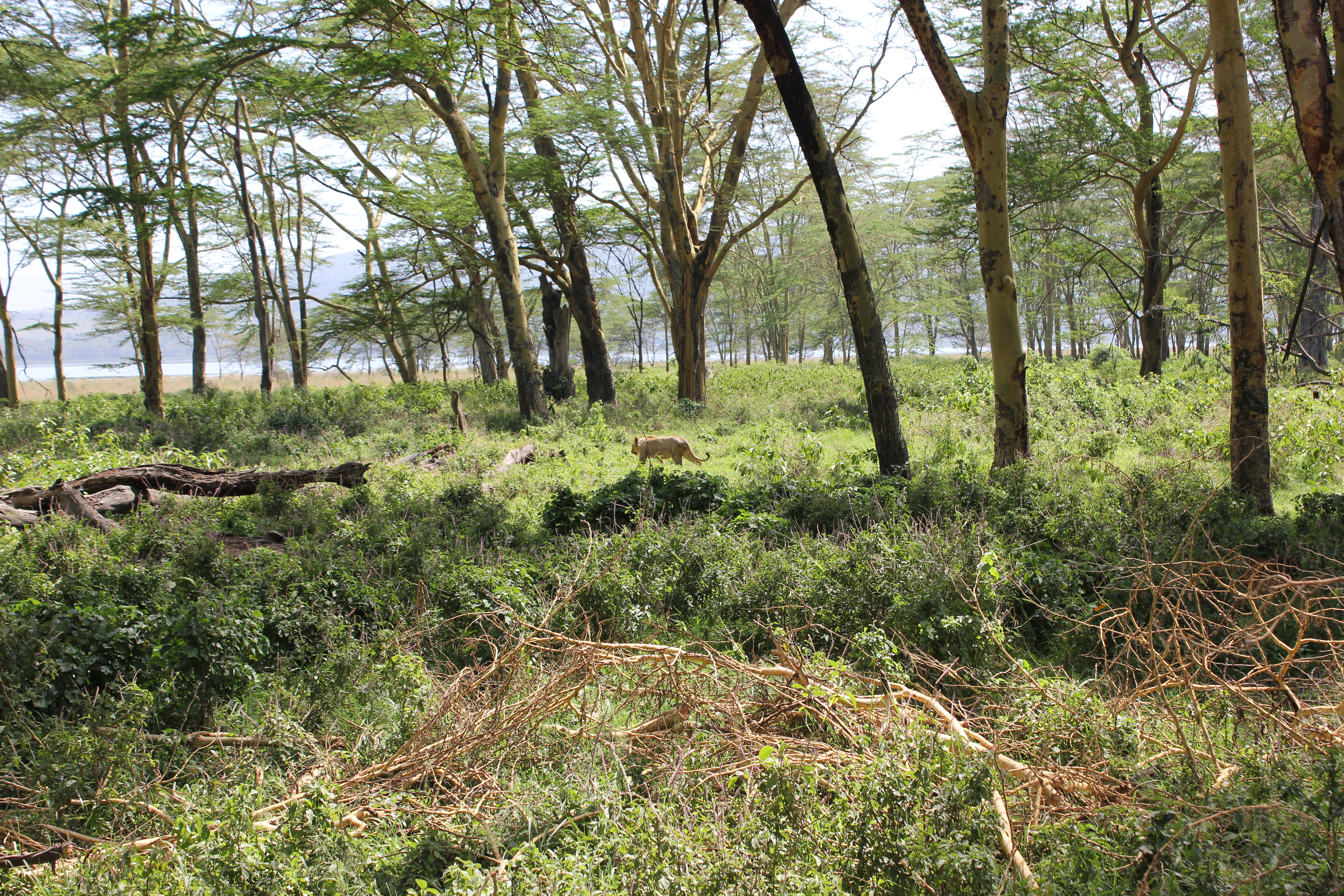 Lake Nakuru National Park